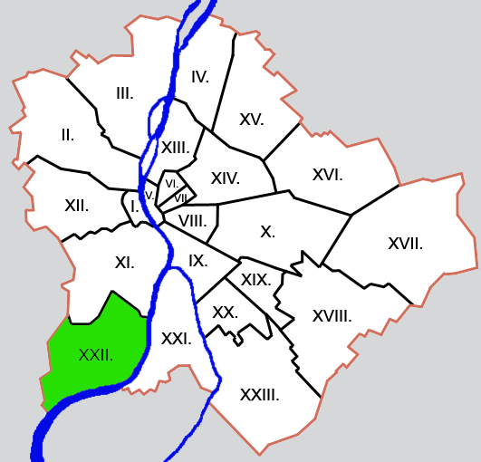 Budapest kerületei: XXII. kerület